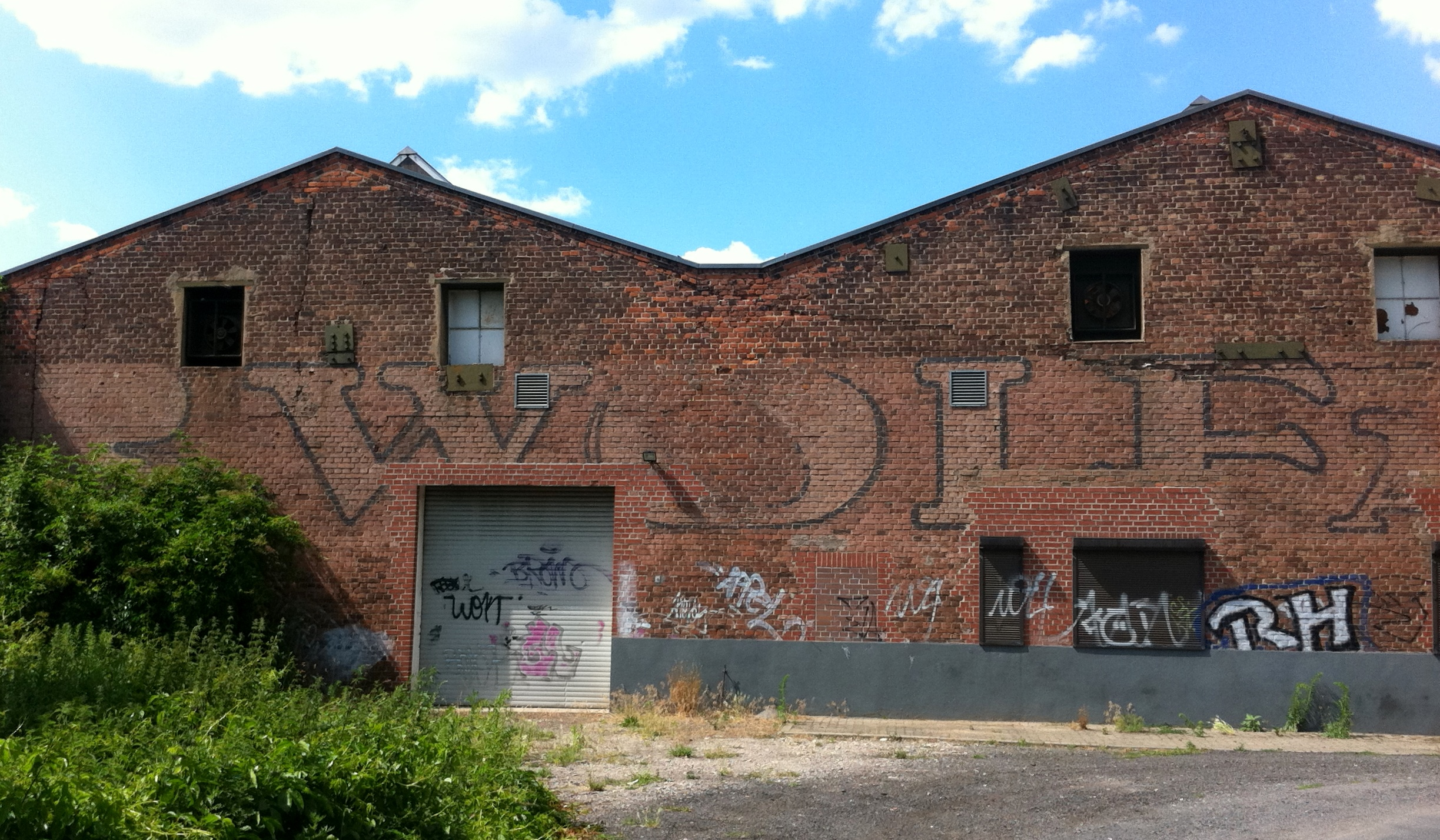 Schriftzug R WOLF AG am Lüttgen-Salbker-Weg in Salbke